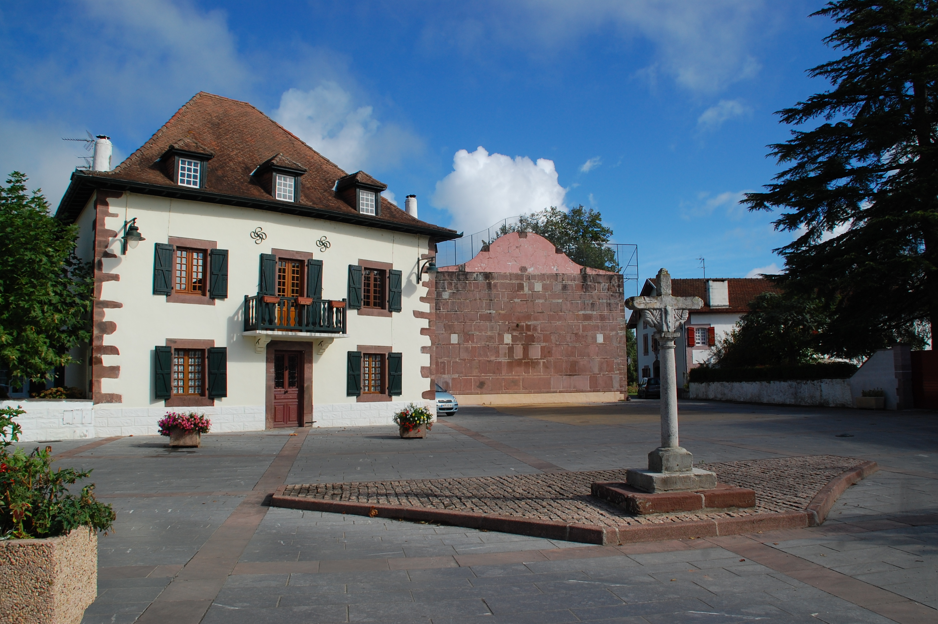 Croix et place centrale.